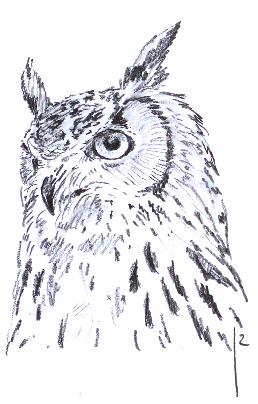 Bubo bubo